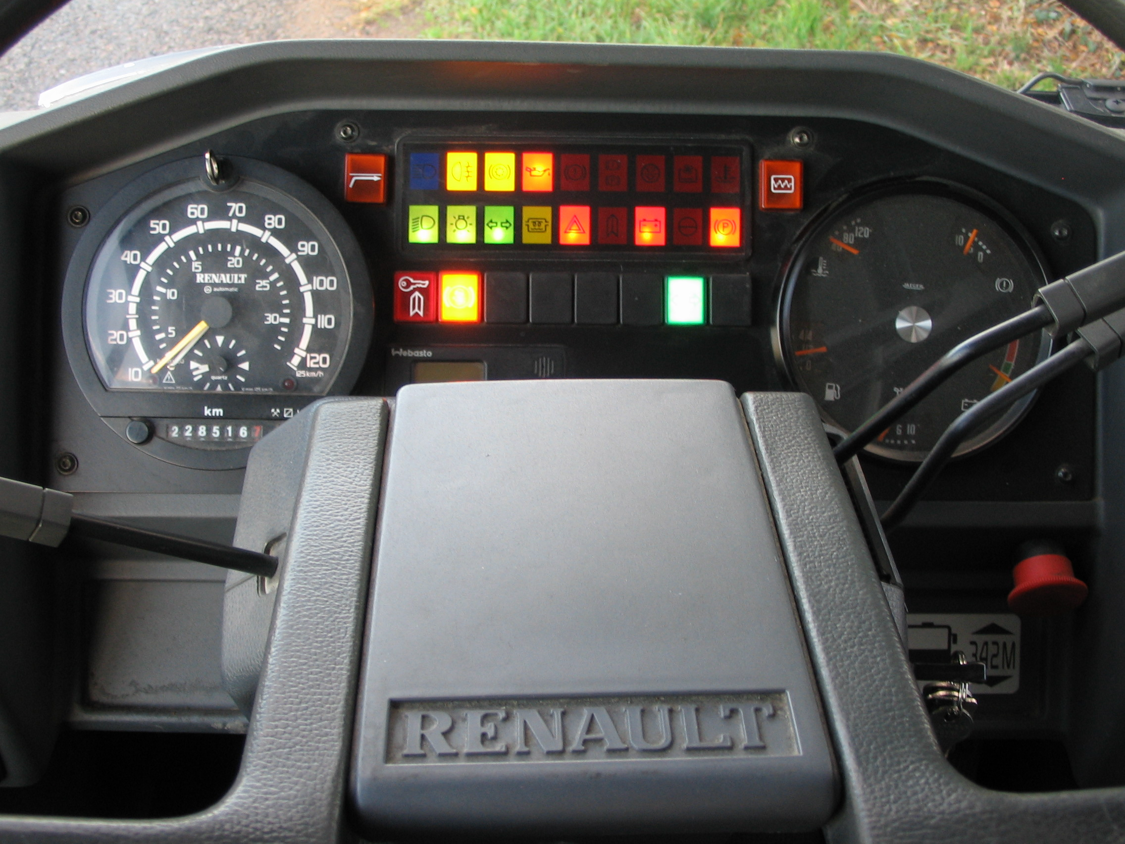 Combiné d'instruments éclairé, Renault Tracer (1999).